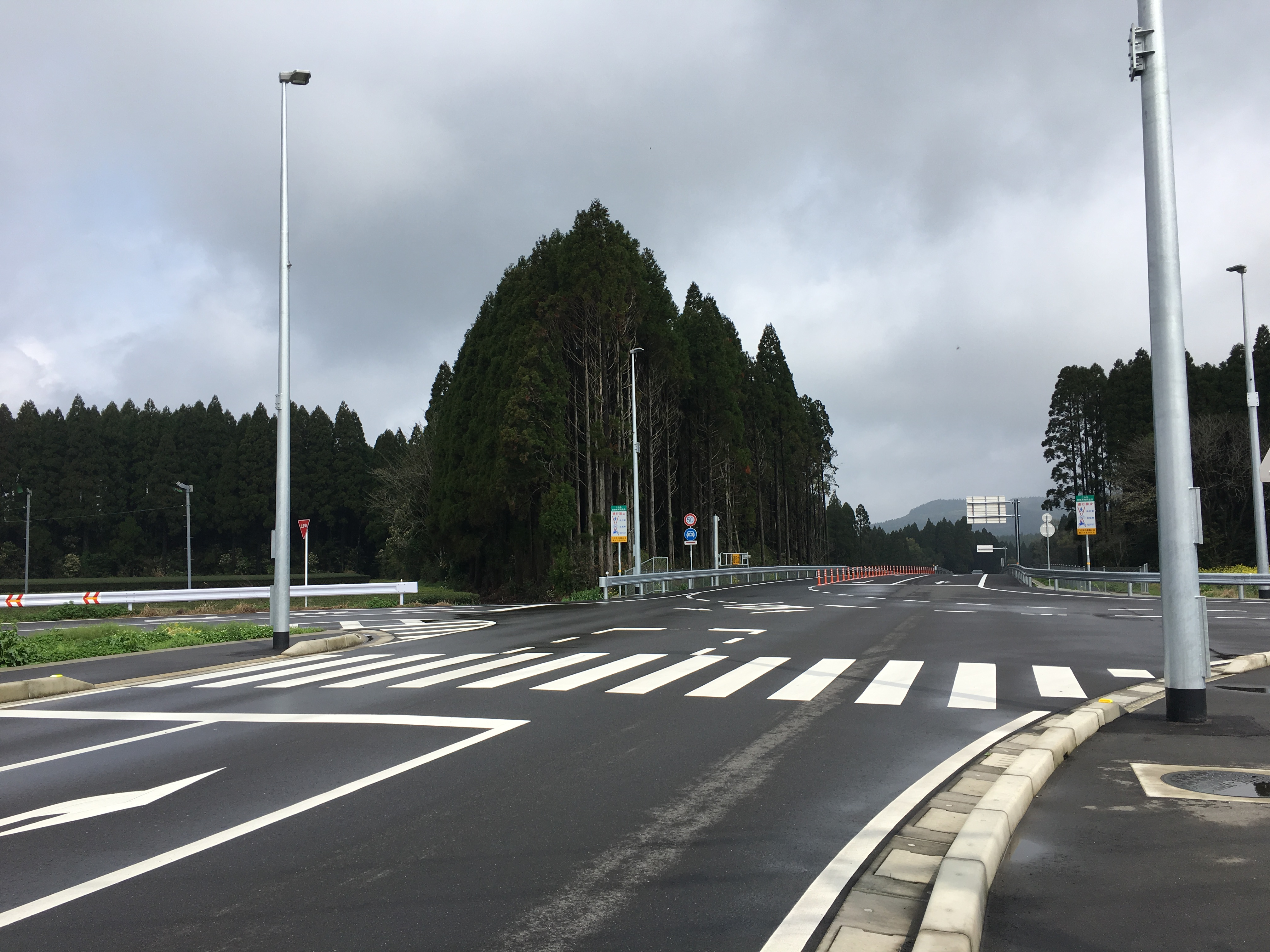 南九州知覧インターチェンジを枕崎方面から鹿児島方面を望む。南九州知覧インターチェンジから鹿児島方面は自動車専用道路となっている。